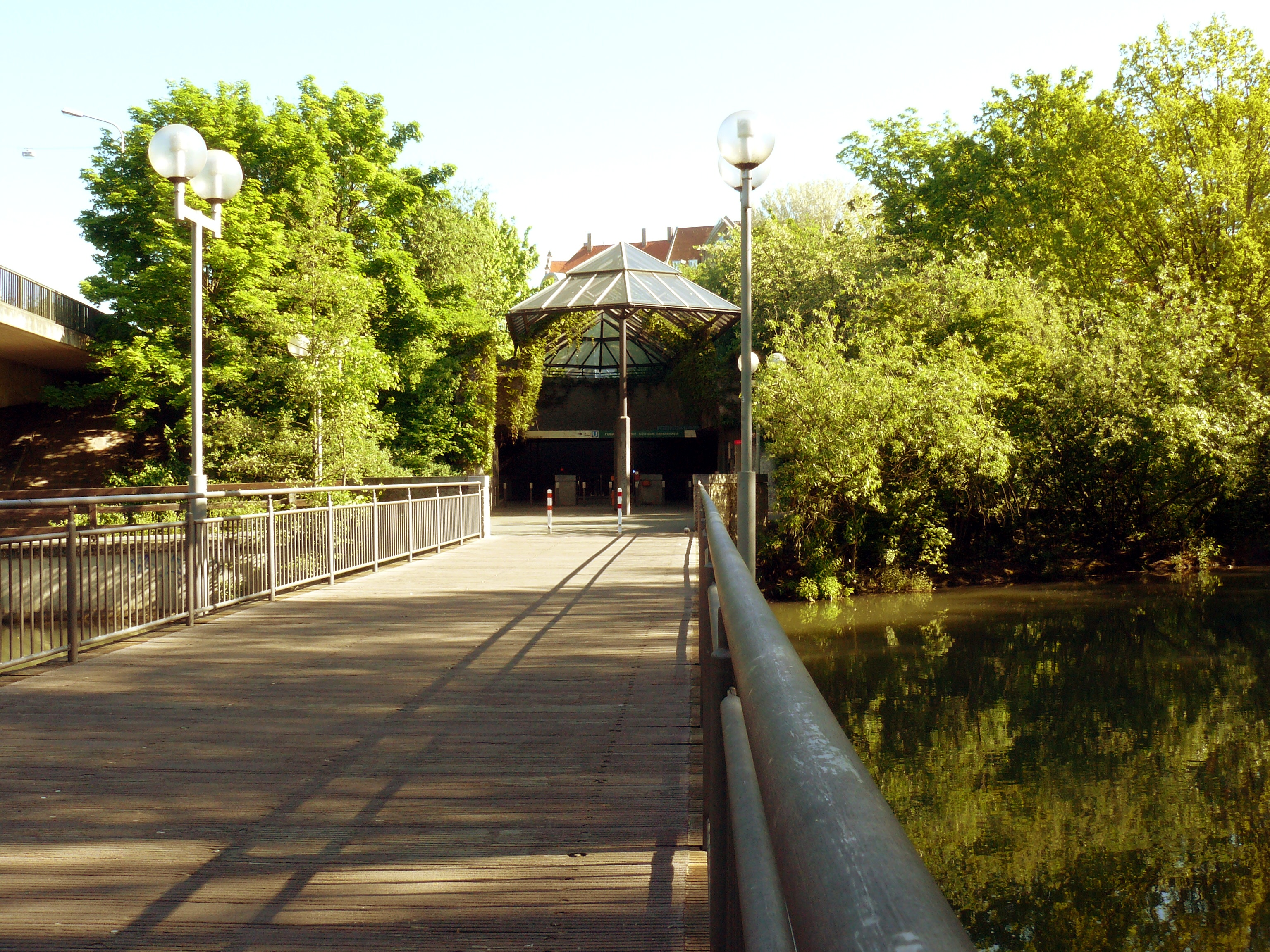 Südlicher Zugang zum U-Bahnhof Nürnberg Wöhrder Wiese